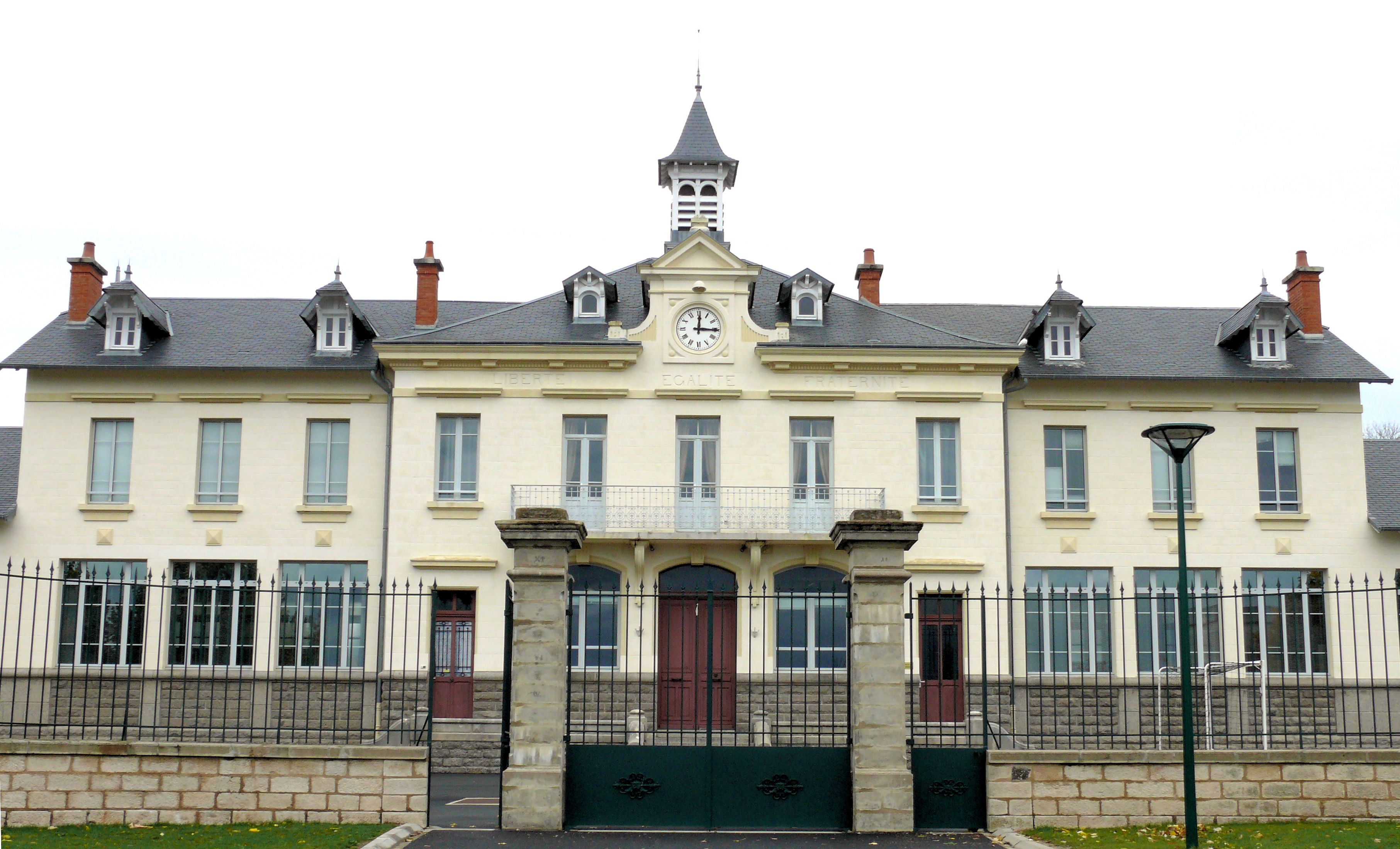 Tronget - Mairie